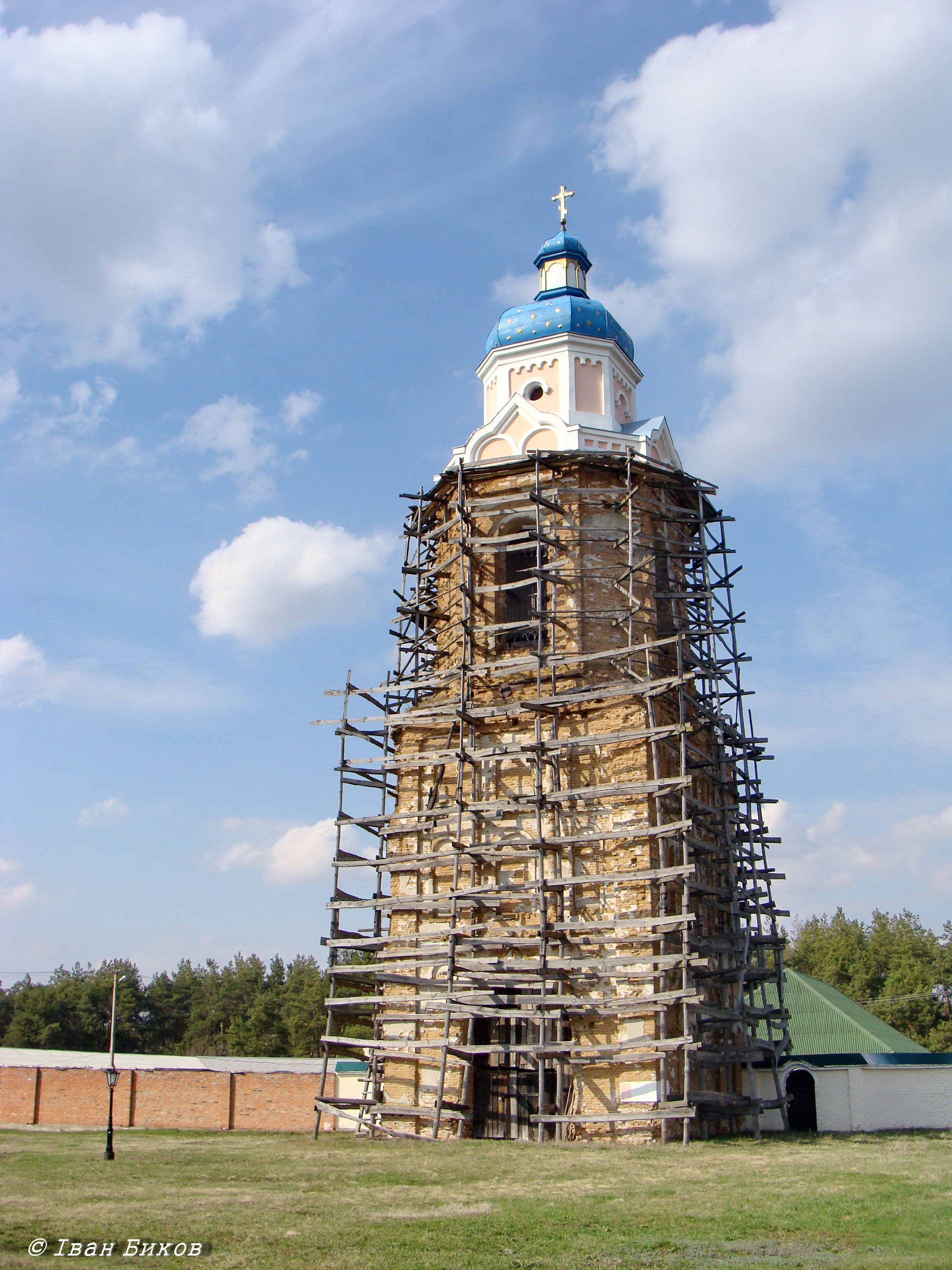 Дзвіниця (мур.), Осіч